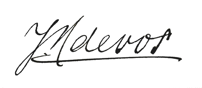 Jan de Vos signature.